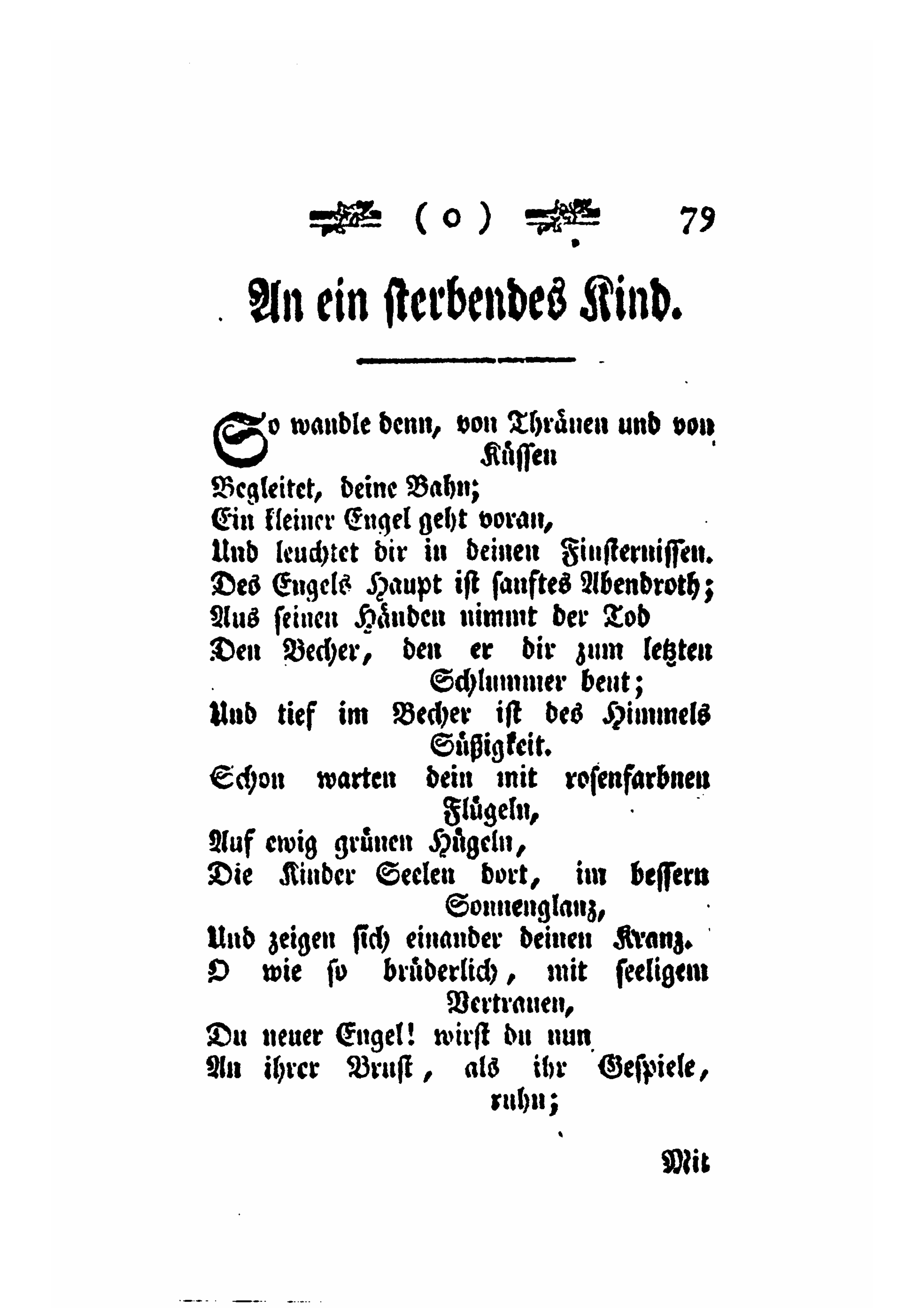 Iris. Düsseldorf; Berlin bey Haude und Spener, 1774-1776. Erster Band. 1774.